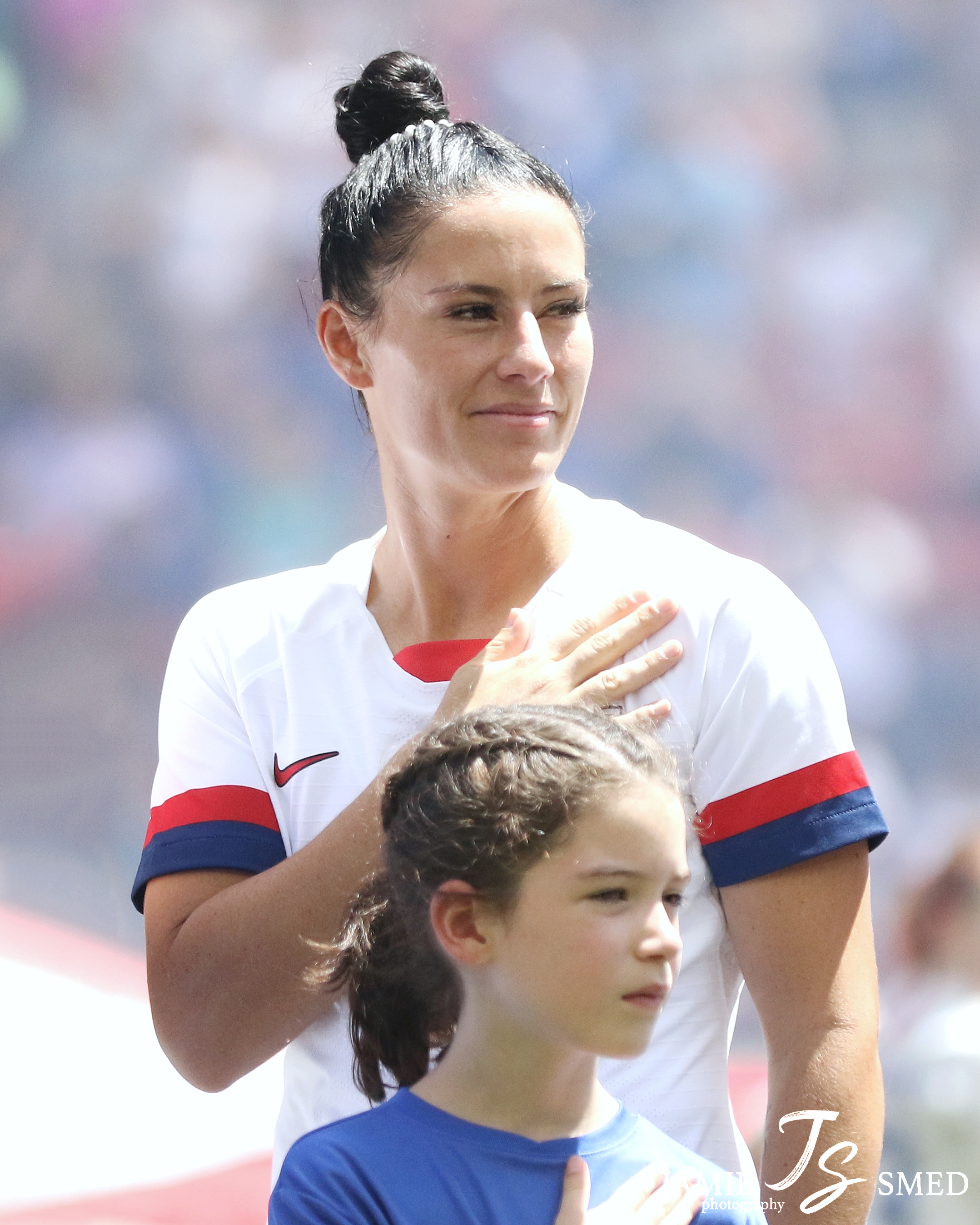 Ali Krieger